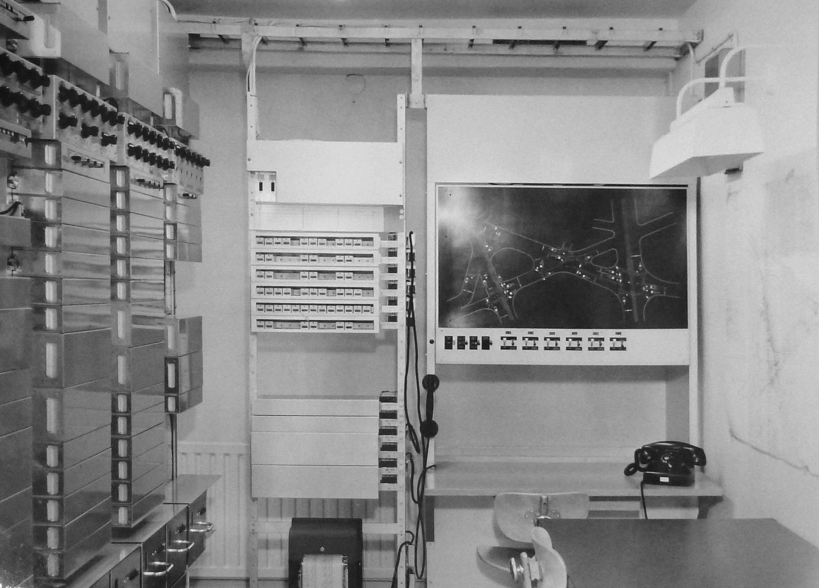 Signalstyrningsrum för trafiksignalet under S:t Eriksplan